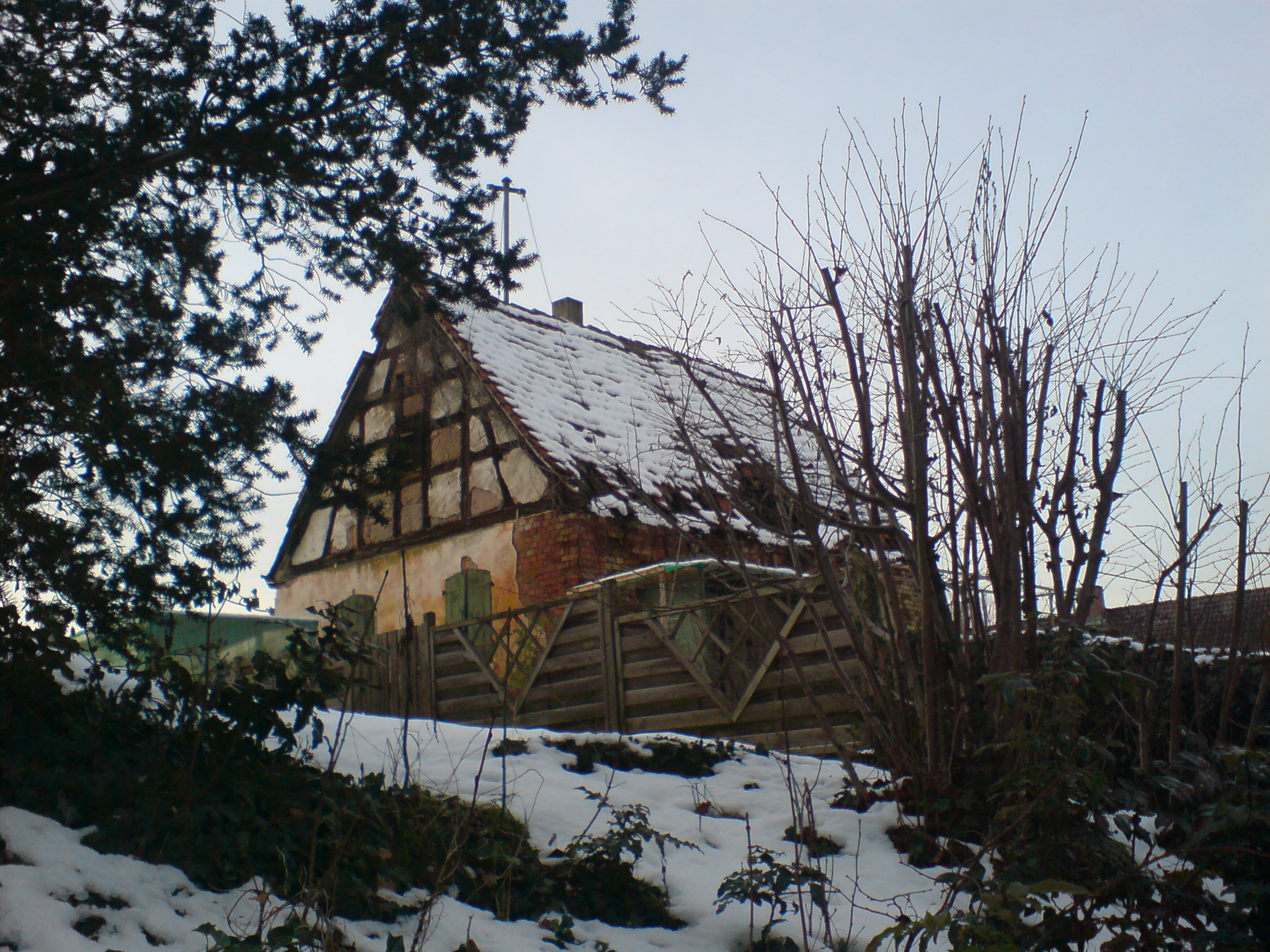 Denkmalgeschütztes ehemaliges Gesindehaus der Erichmühle